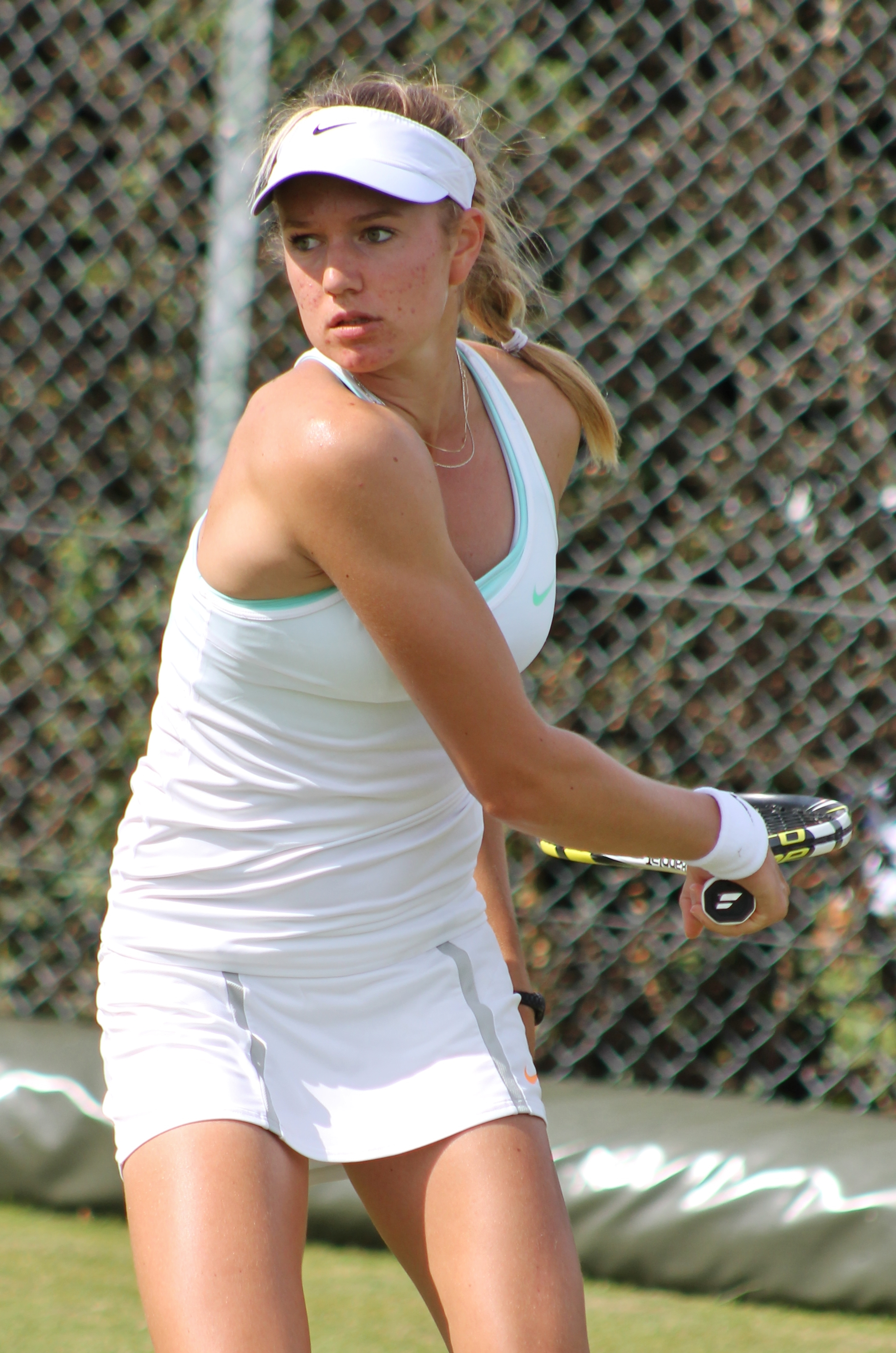 de Vroome WMQ14 (12)